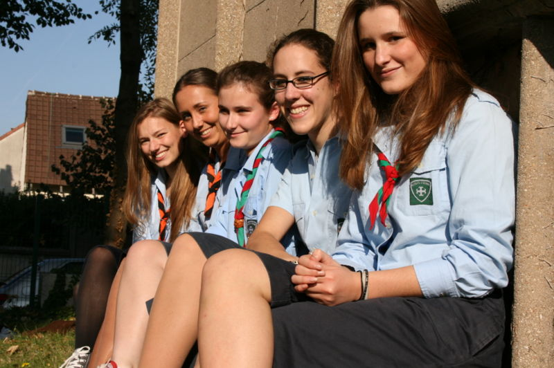 Guides-Aînées, rentrée scoute des Scouts et Guides Saint Benoît - Rungis 2009